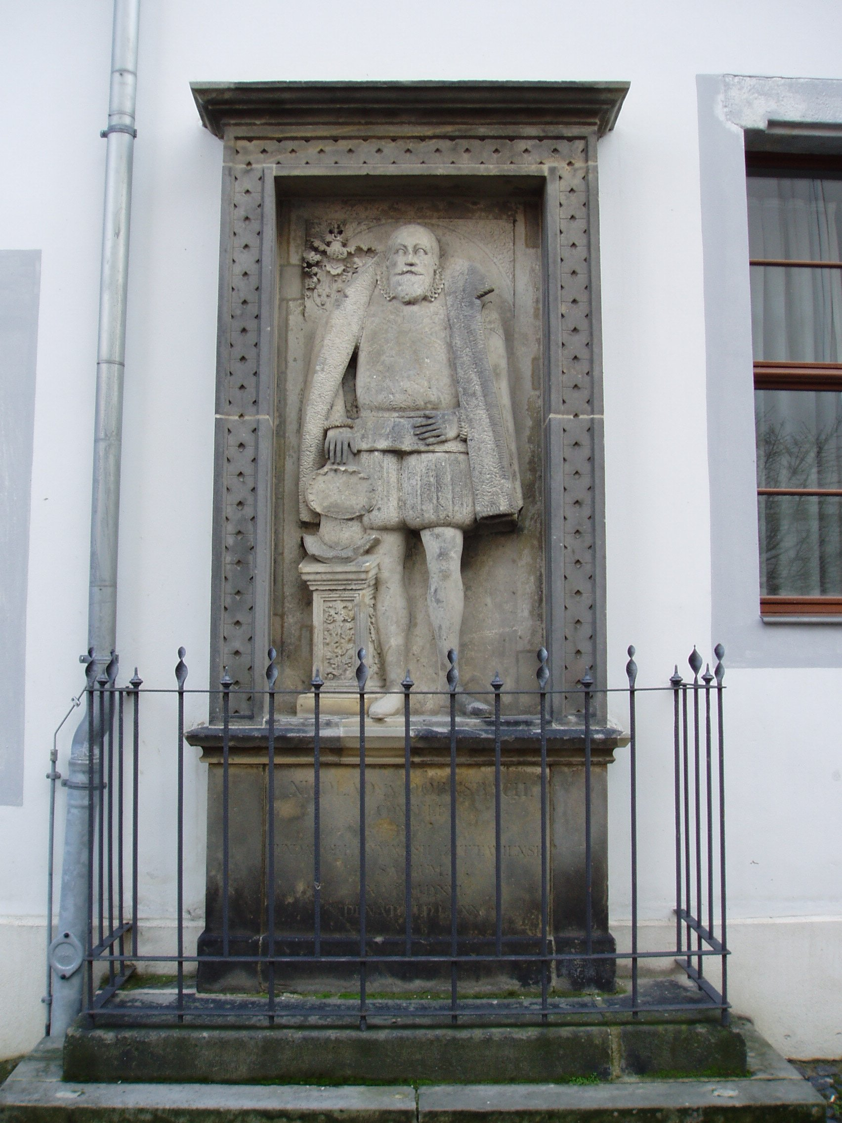 Grabplatte von Nikolaus von Dornspach